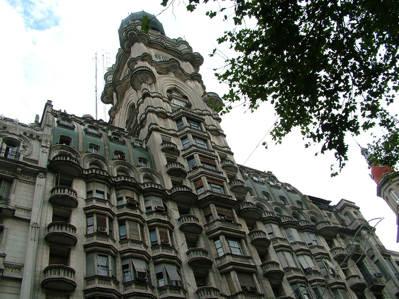 Palacio Barolo, Avenida de Mayo 1370, Buenos Aires, Argentina.DSCF1890.JPG